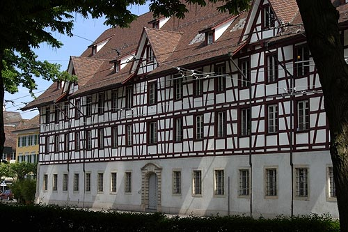 Alte Kaserne in Winterthur (Nr. 03.1-5478)